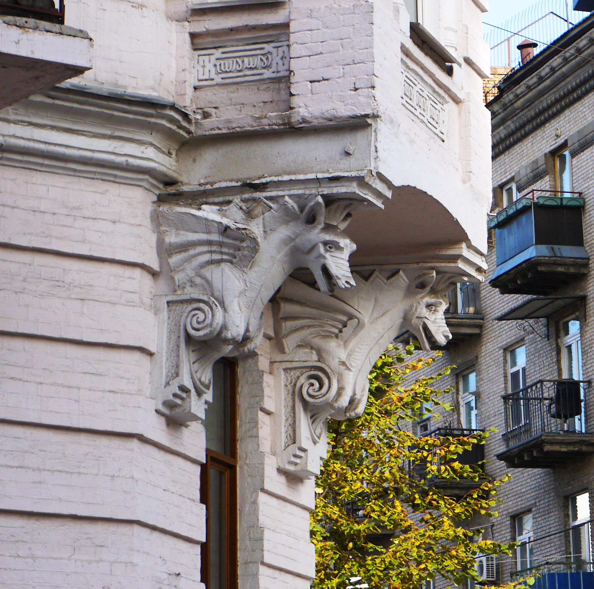 Житловий будинок, в якому проживали П. І. Бєлоусов, адвокат, політичний діяч та О. С. Кривошеєв, архітектор, Київ, вул. Рейтарська, 31/16